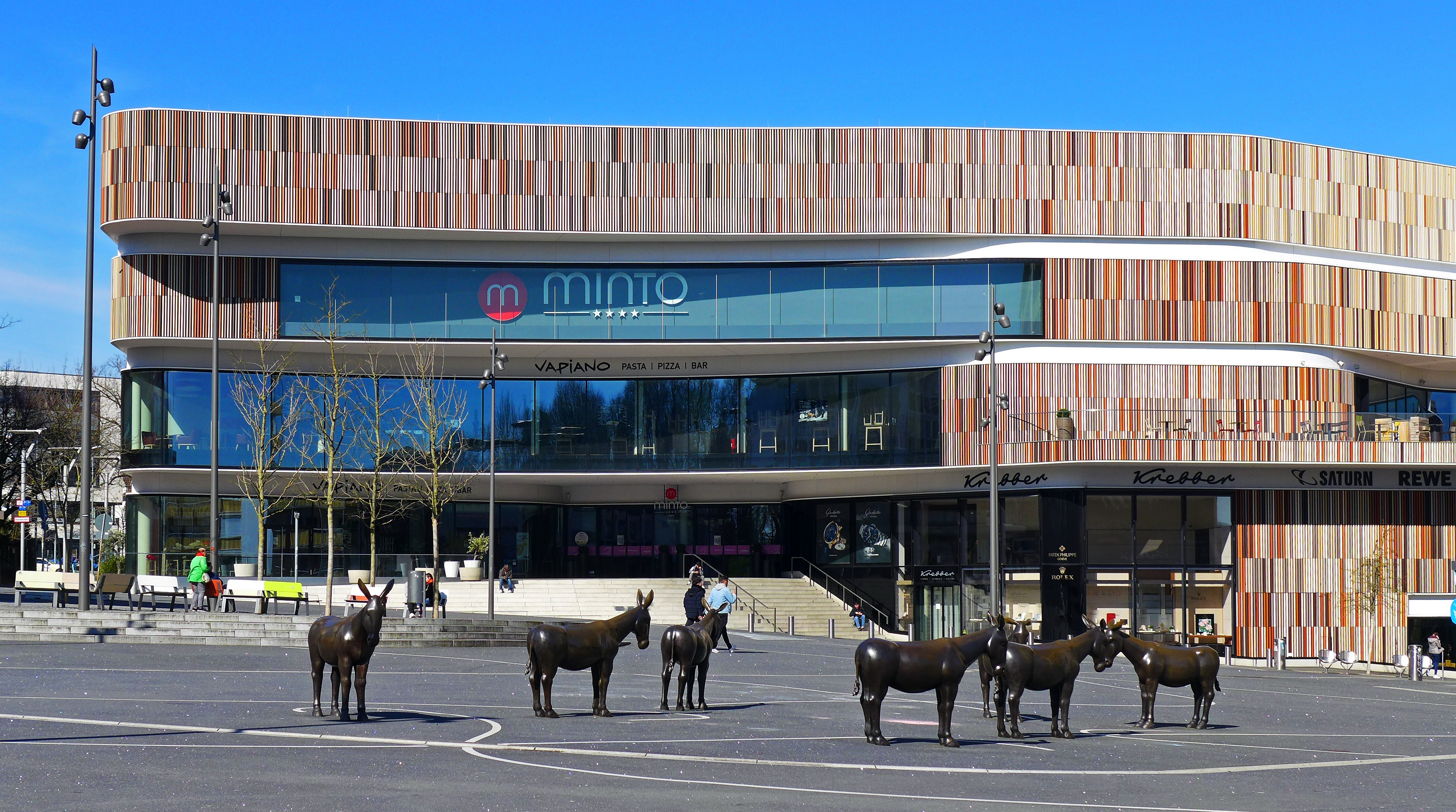 Minto - Haupteingang